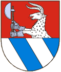 Znak města Kožlany